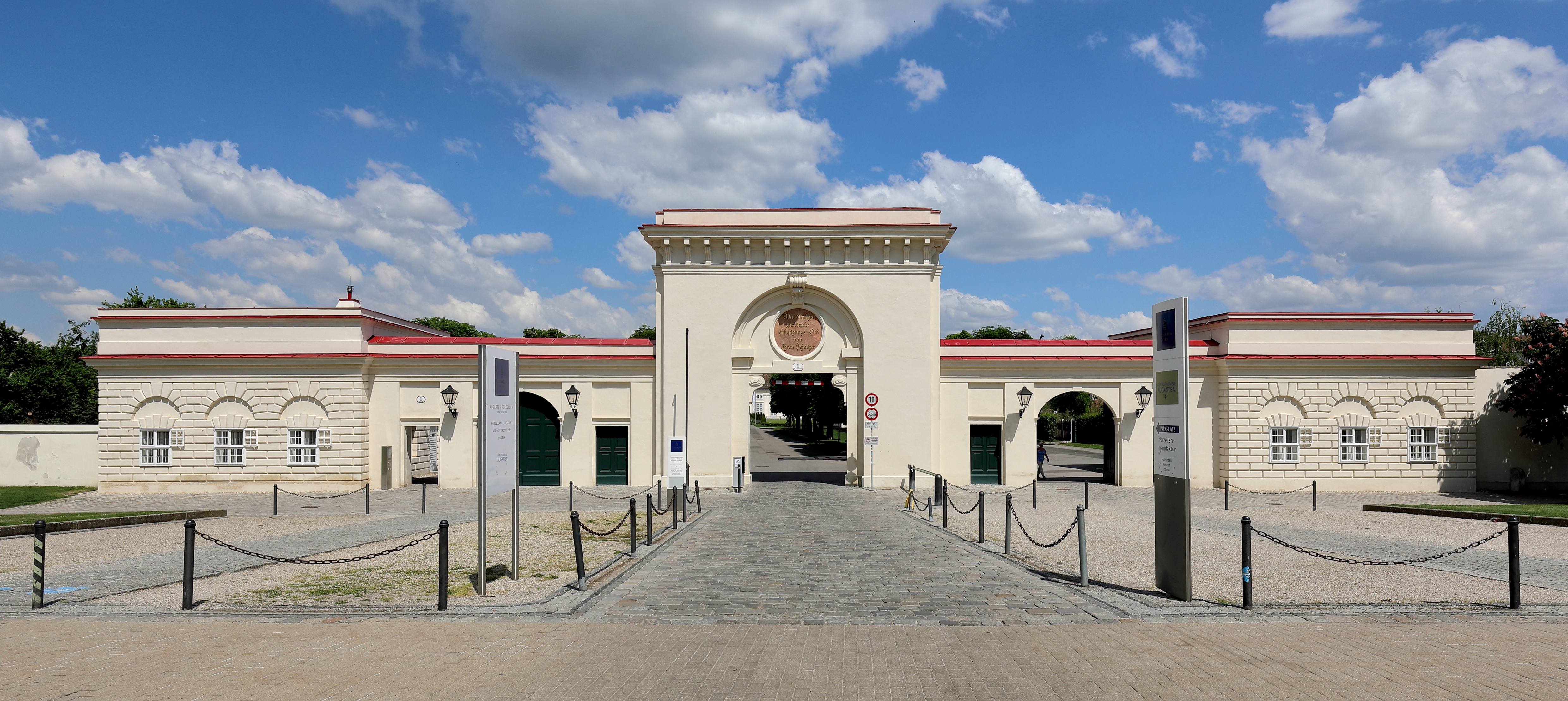 Das Eingangsportal bzw. Haupttor des Augartens im 2. Wiener Gemeindebezirk Leopoldstadt. Das Areal war ursprüngliche ein Schlosspark. Am 30. April 1775 machte Kaiser Josef II. den Augarten der Allgemeinheit zugänglich und ließ das von Isidore Canevale entworfene triumphbogenartige Eingangsportal errichten. Über der Durchfahrt bzw. Durchgang sind die Worte zu lesen: „Allen Menschen gewidmeter Erlustigungs-Ort, von Ihrem Schaetzer.“